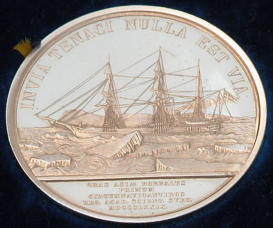 Jetong av silver. På åtsidan en graverad bild föreställande Vega i ishavet omgiven av tjocka isstycken. Fartyget ses från babords sida. Röken, flagga och vimpel indikerar att hon rör sig åt vänster. Över bilden står längs jetongens kant texten "INVIA TENACI NULLA EST VIA" (Fritt översatt: "För den på vägen uthållige är vägen intet") Under bilden står i ett fält med horisontella bokstäver texten "ORAS ASIAE BOREALES PRIMUM CIRCUMNAVIGANTIBUS REG.ACAD.SCIENT. SVEC. MDCCCLXXIX" ("Till dem som första gången kringseglade norra Asiens kuster Kungliga Svenska Vetenskapsakademien år 1879") På frånsidan silhuettbilder av huvudena av A.A.L. Palander (fartygschef på Vega) och A.E. Nordenskiöld (expeditionens ledare) samt deras namn i versala bokstäver längs kanterna. Under bilden på Palander står gravörens namn.